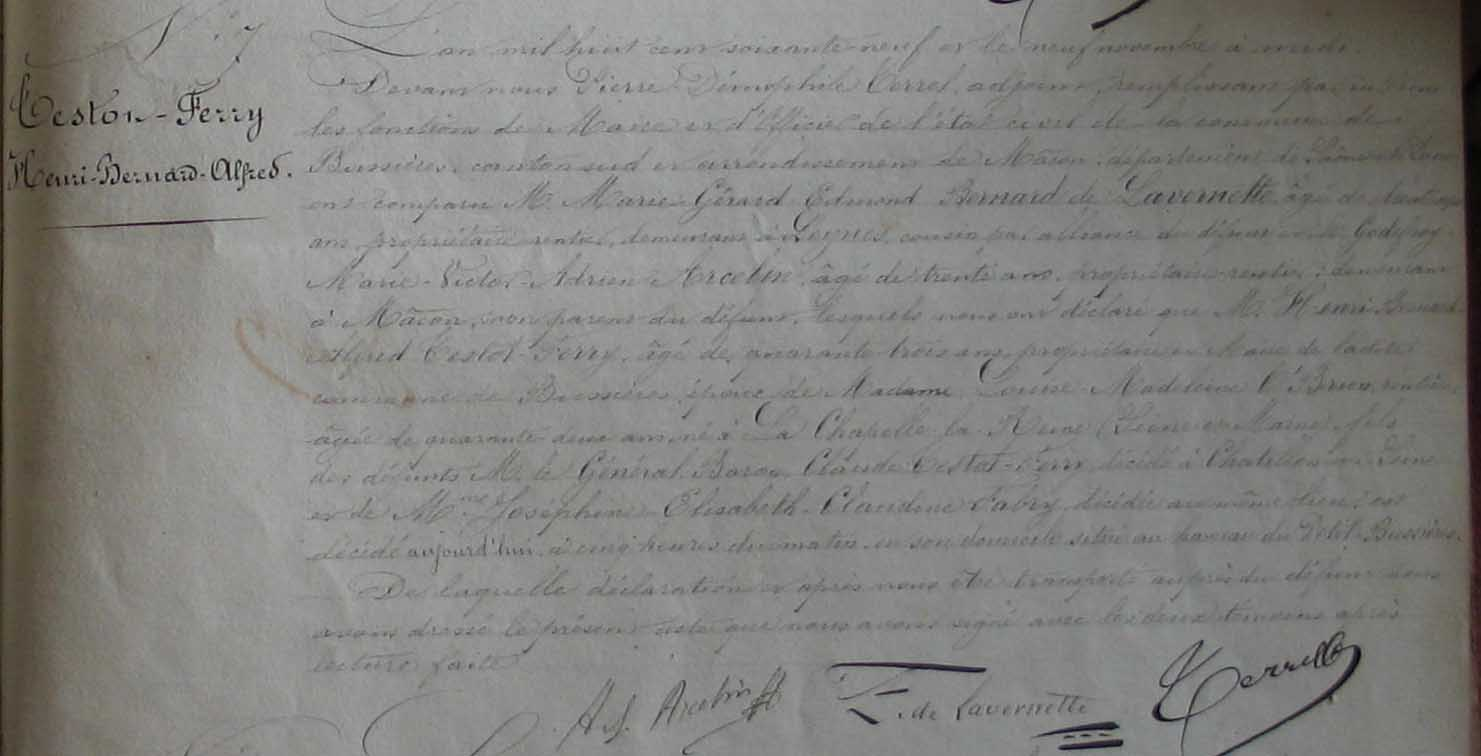 Photo de l'état civil de Bussières prise par mes soins Fredlep4